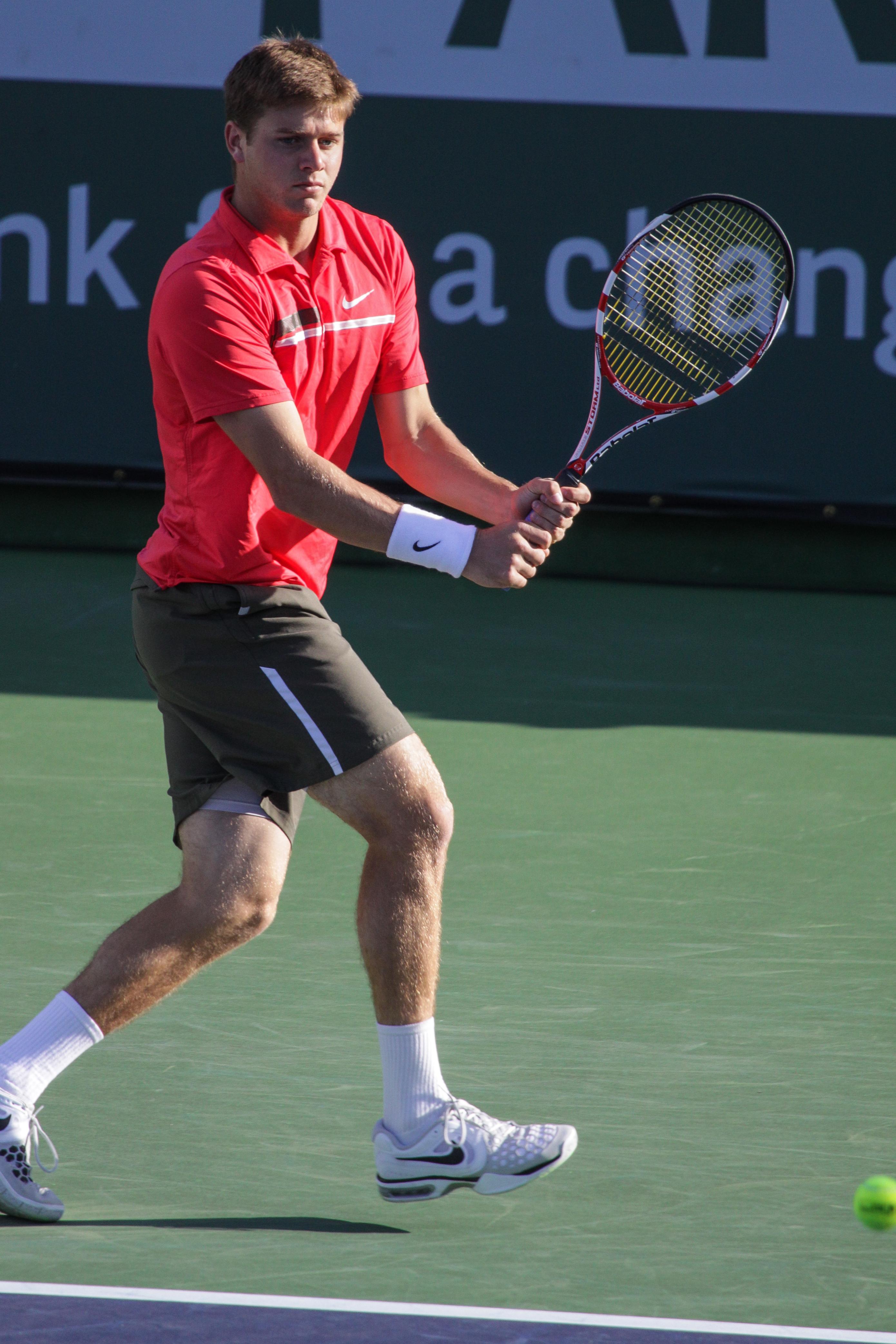 Ryan Harrison @ BNP Paribas 2012 Open